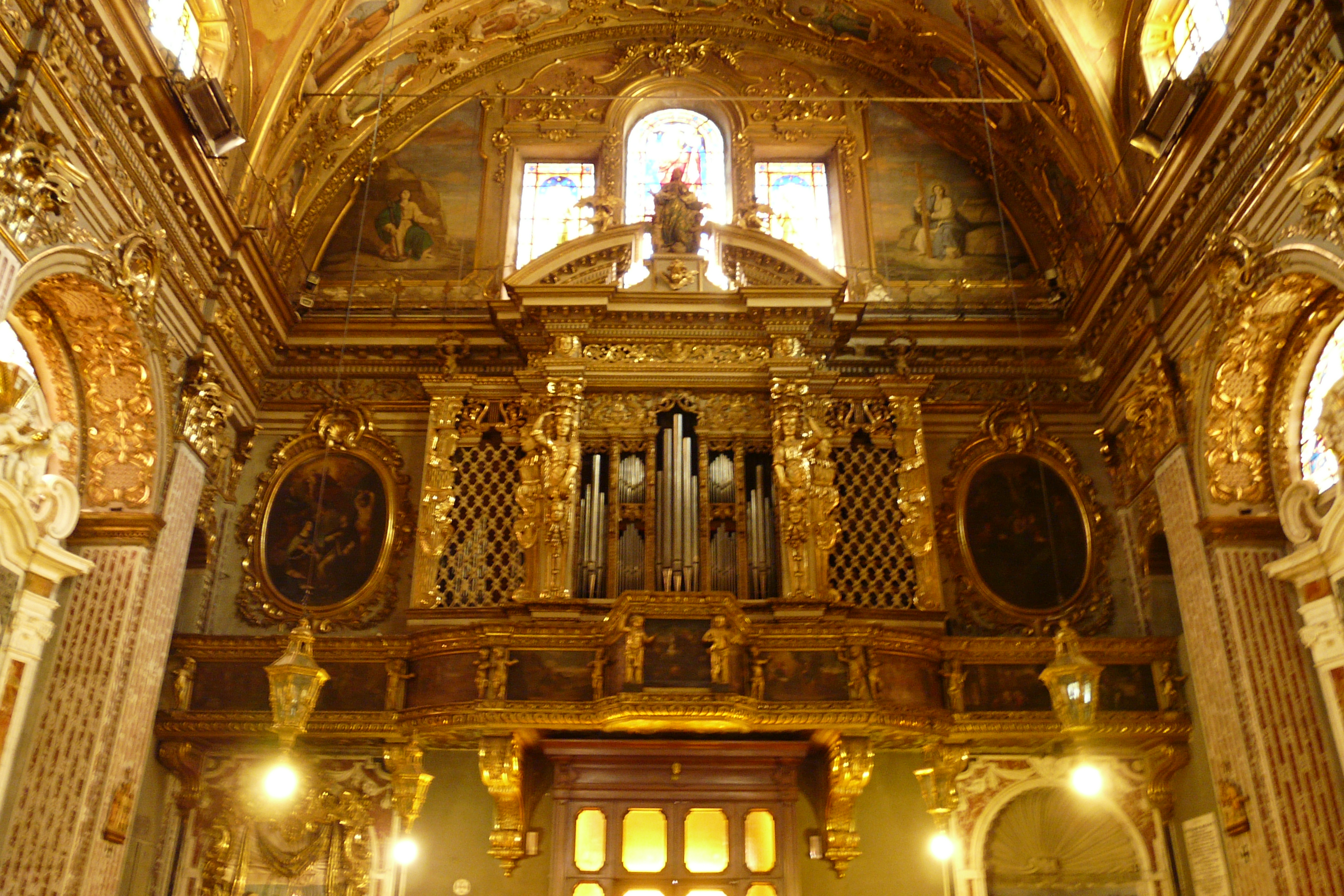 Chiesa di San Giacomo di Rupinaro, Chiavari, Liguria, Italia